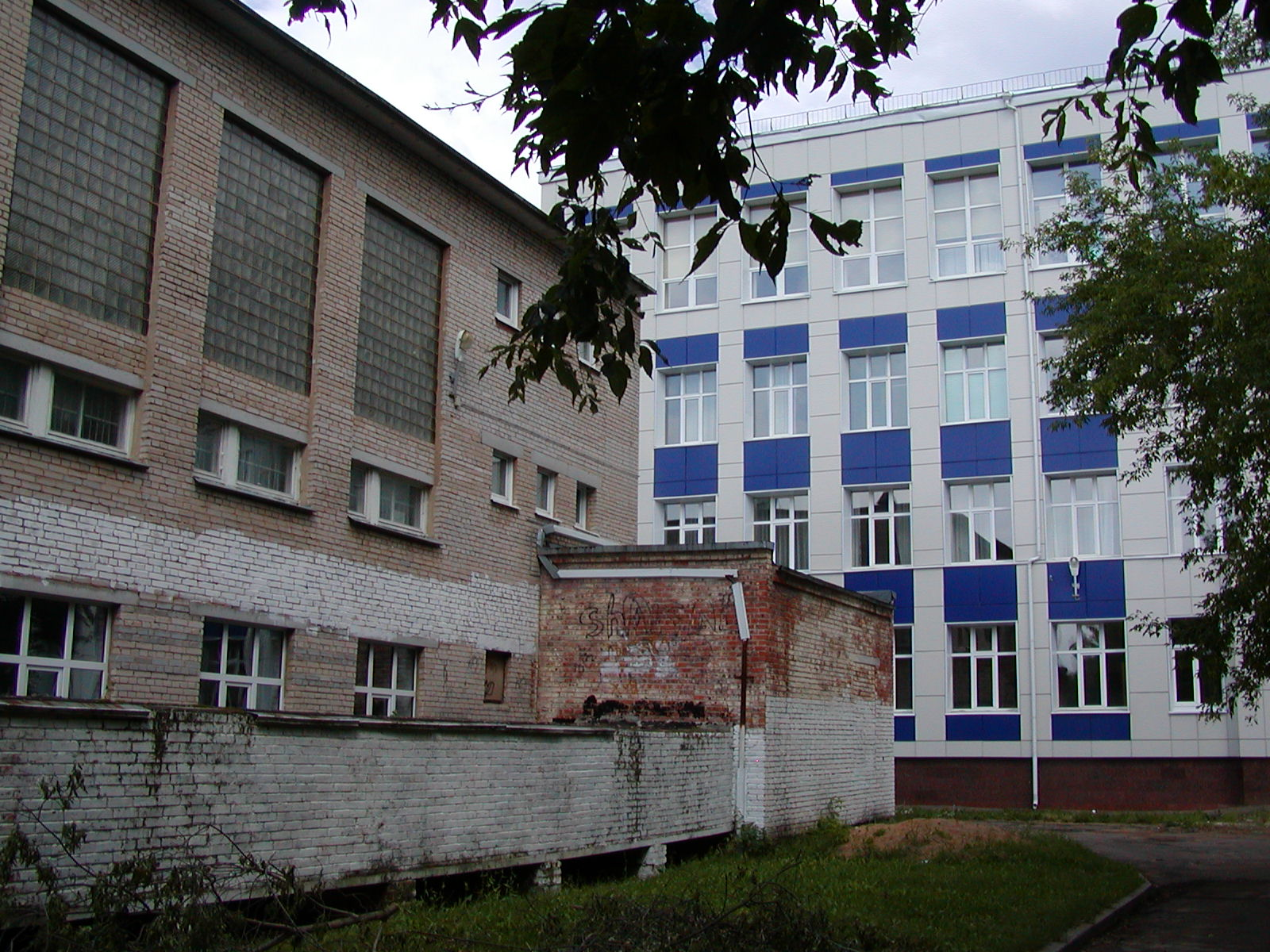 Вид Гимназии города Обнинска с задней стороны.